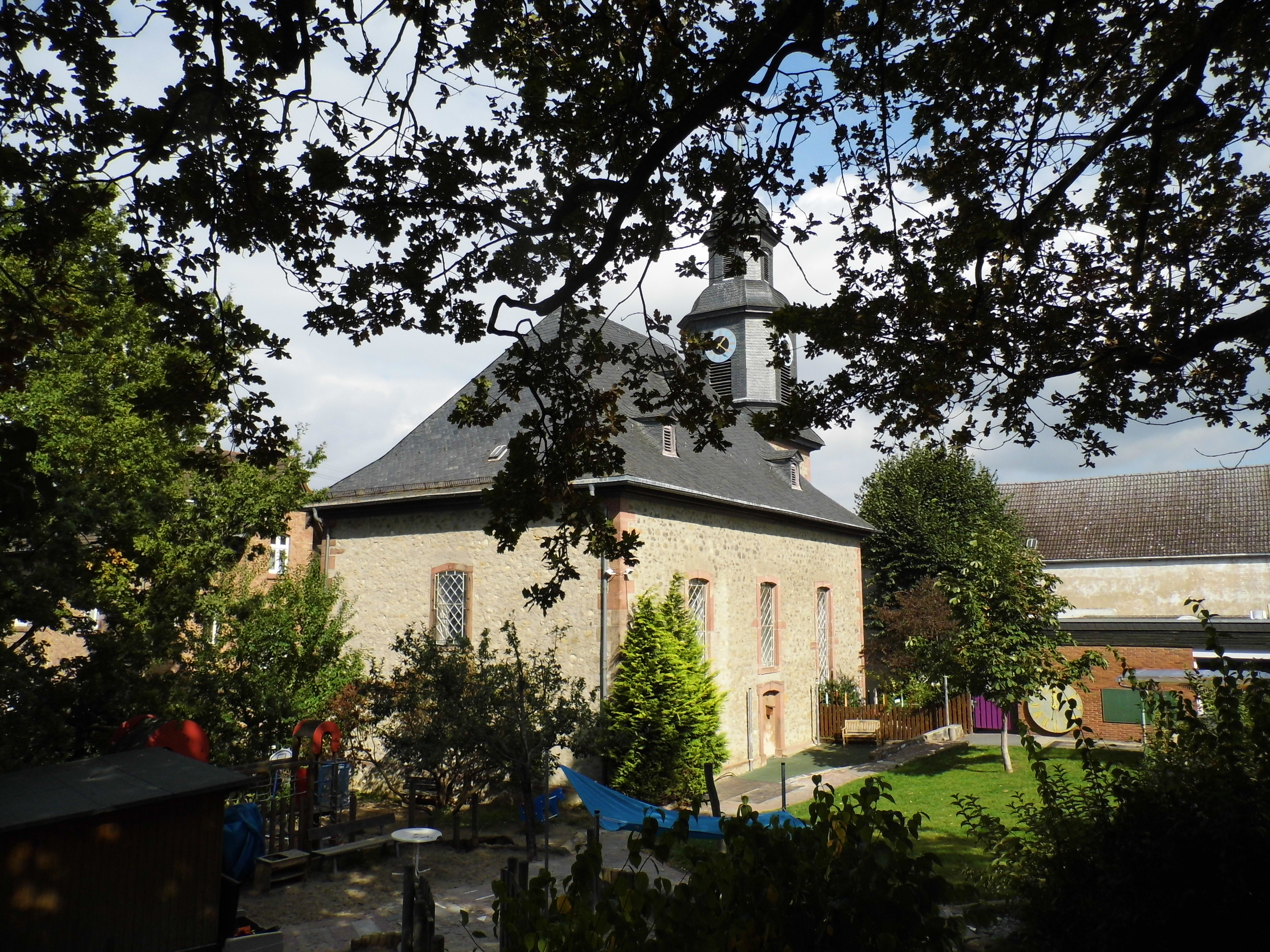 Berkersheim, Kirche, Rückseite